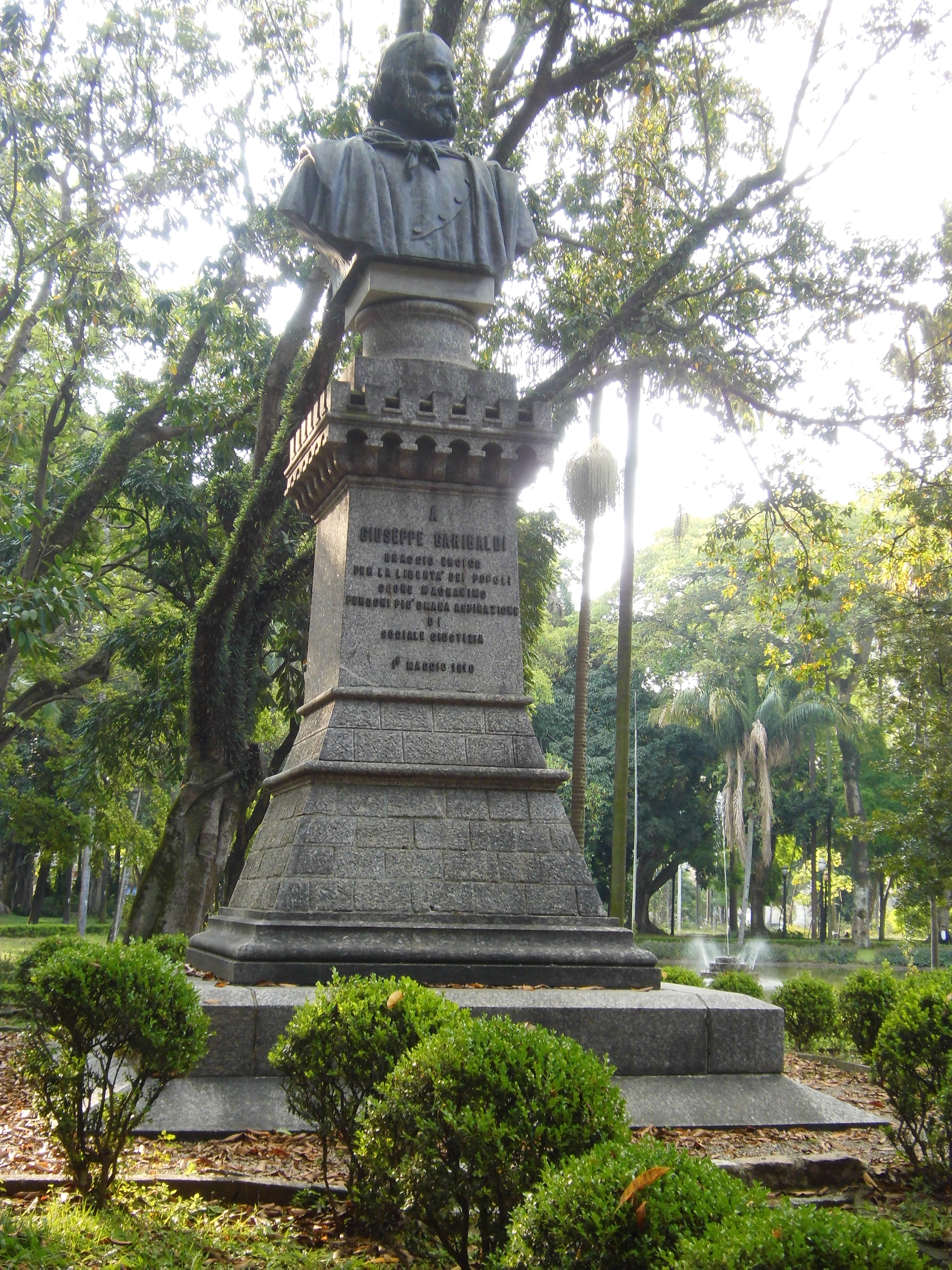 Busto do parque Jardim da Luz (São Paulo-SP, Brasil) em homenagem a Giuseppe Garibaldi, herói da revolução Farroupilha.